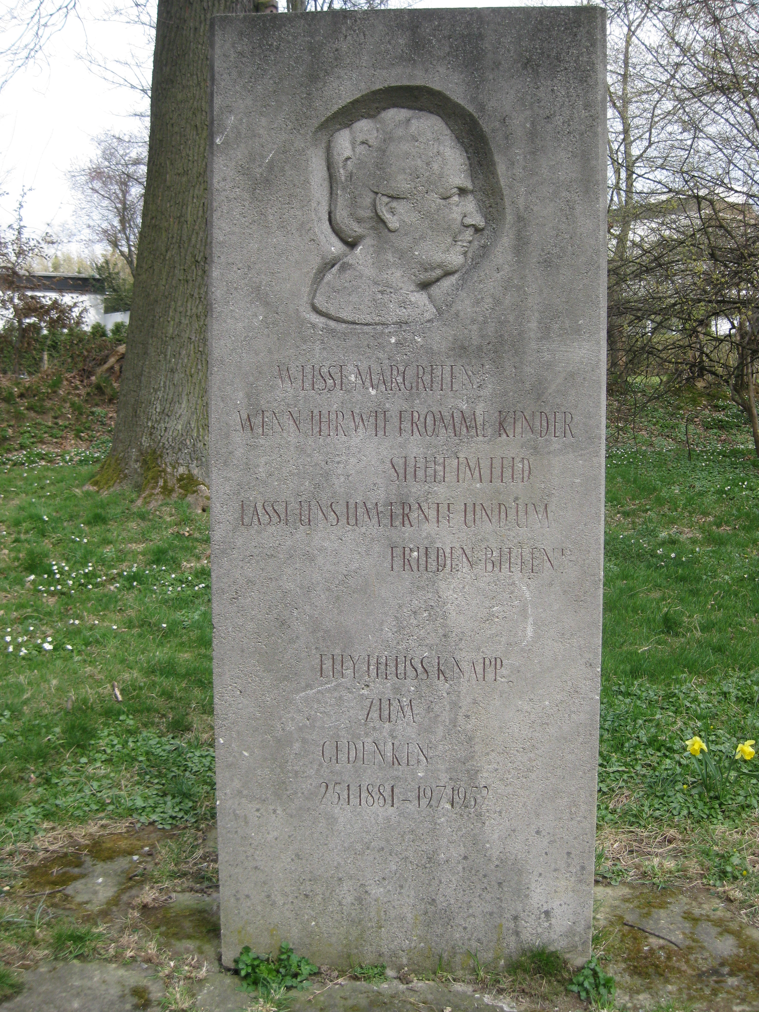 Gedenkstein für Elly Heuss-Knapp, Porträtrelief von Lore Doerr-Niessner, Muschelkalk, Stuttgart-Sillenbuch, Stuttgarter Eichenhain.